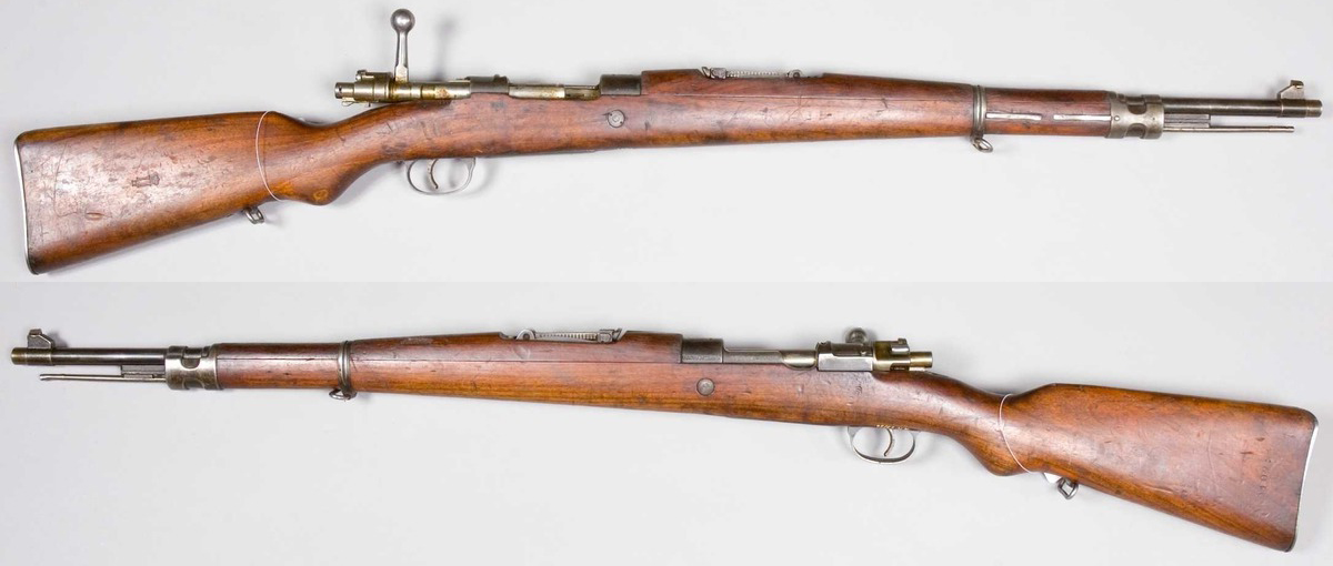 Puška sistema Mauser, iz Kraljevine Srbov, Hrvatov in Slovencev. Model 1924.